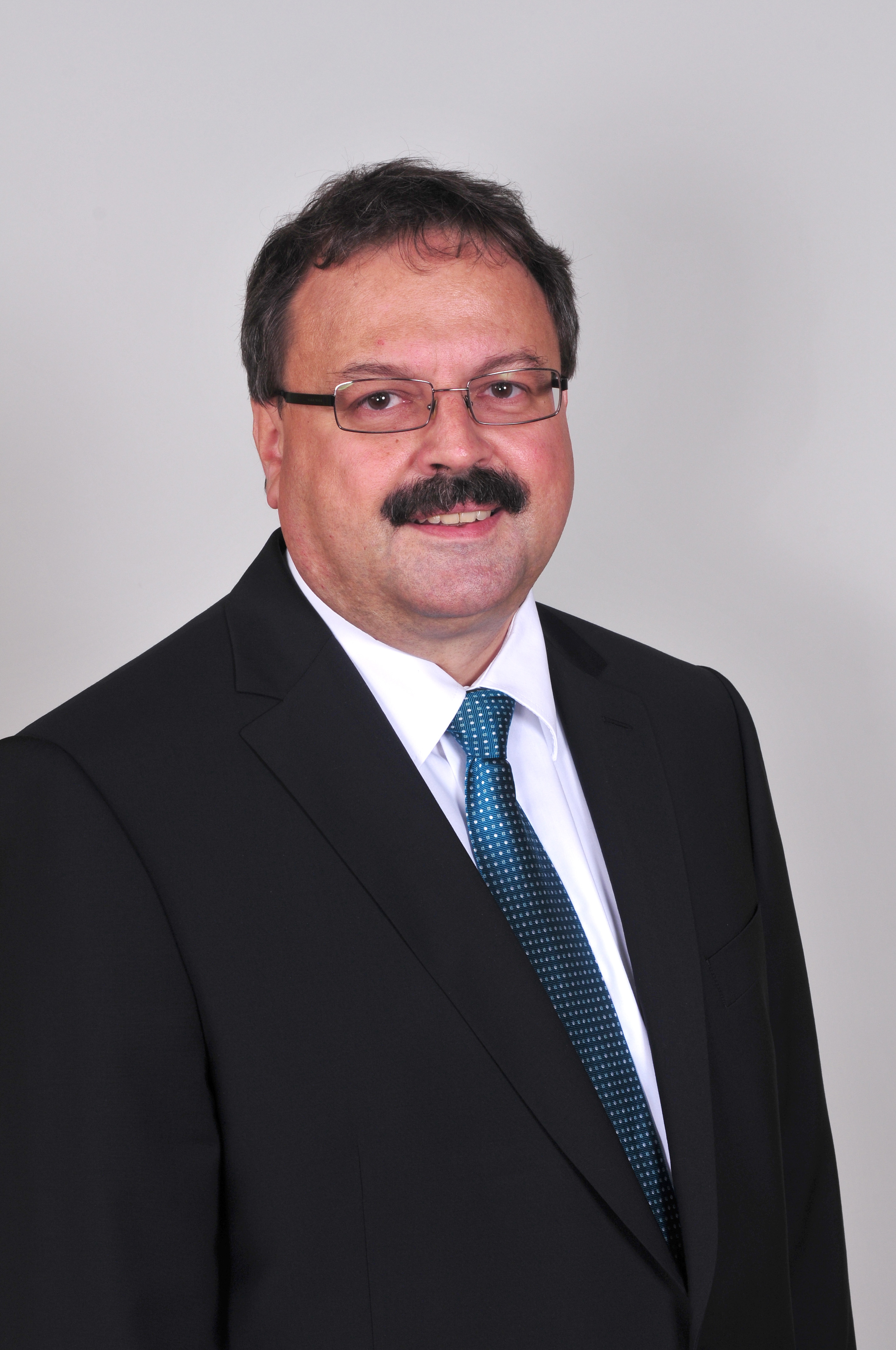 Landtagsprojekt Bayern The making of this work was supported by Wikimedia Austria. For other files made with the support of Wikimedia Austria, please see the category Supported by Wikimedia Österreich. Wikipedia im Landtag – Bayern 17. bis 19. Juli 2012 in München Dieses Foto wurde im Rahmen des Projektes „Wikipedia im Landtag“ erstellt.